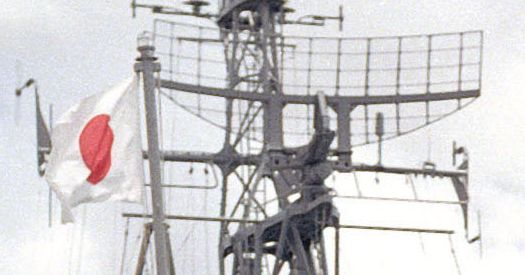 いすず型護衛艦「おおい」（DE-214）搭載のOPS-2レーダー。